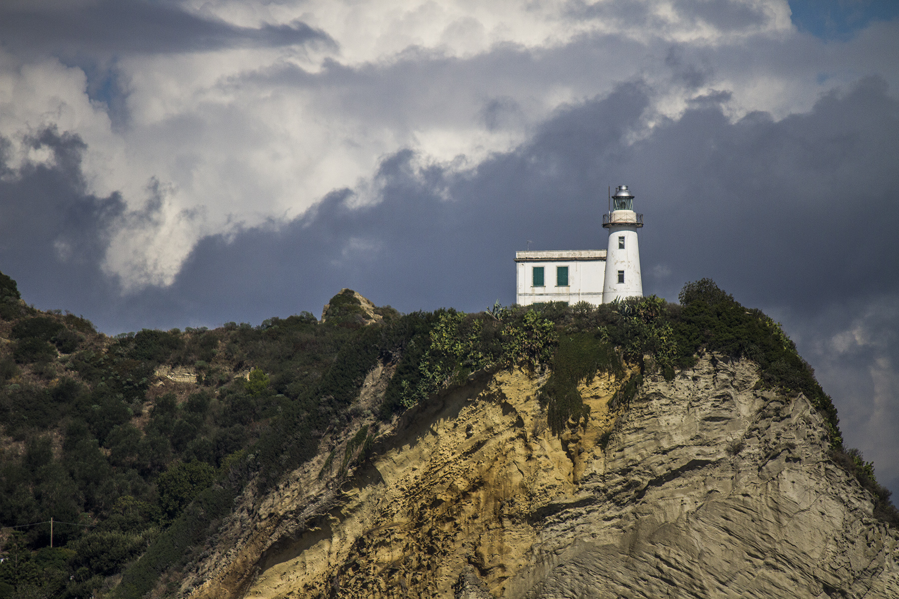 Napoli 3742